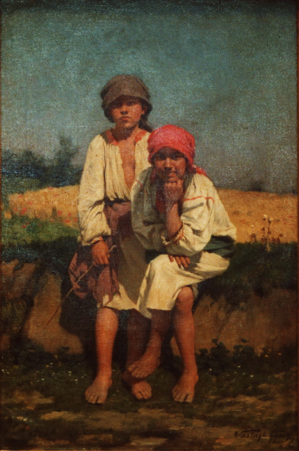 id. Vastagh György: Két parasztlány